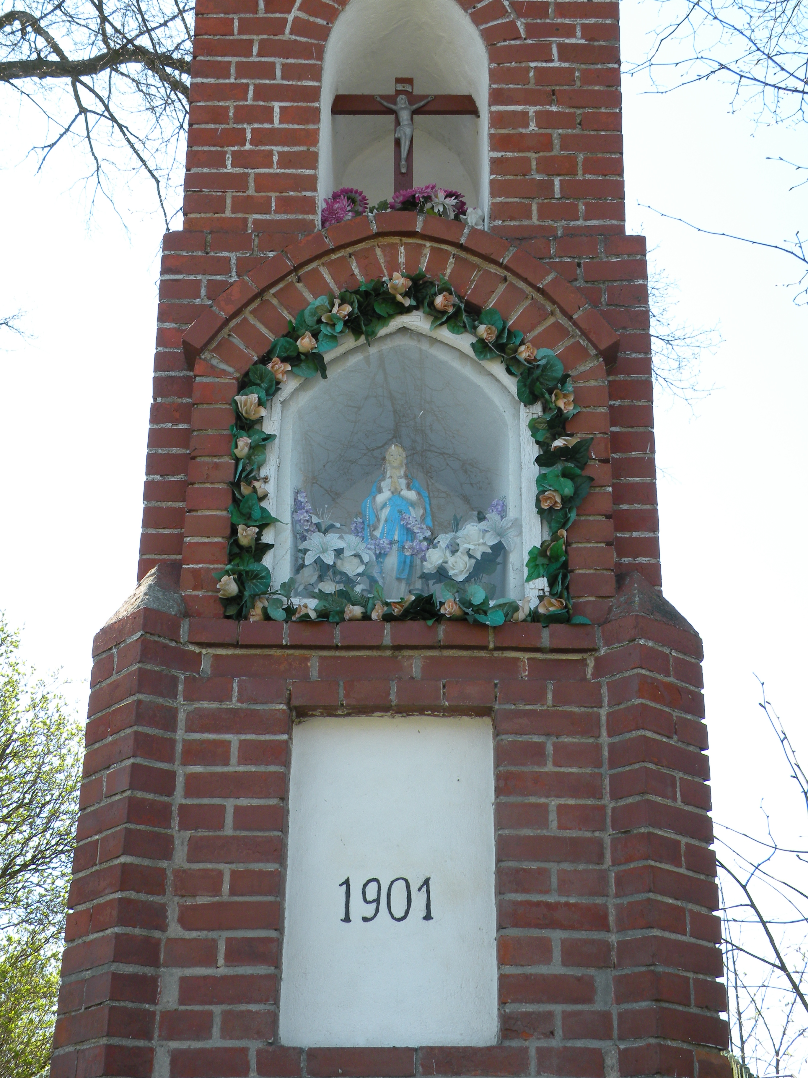 Kapliczka w Prejłowie, widok od drogi